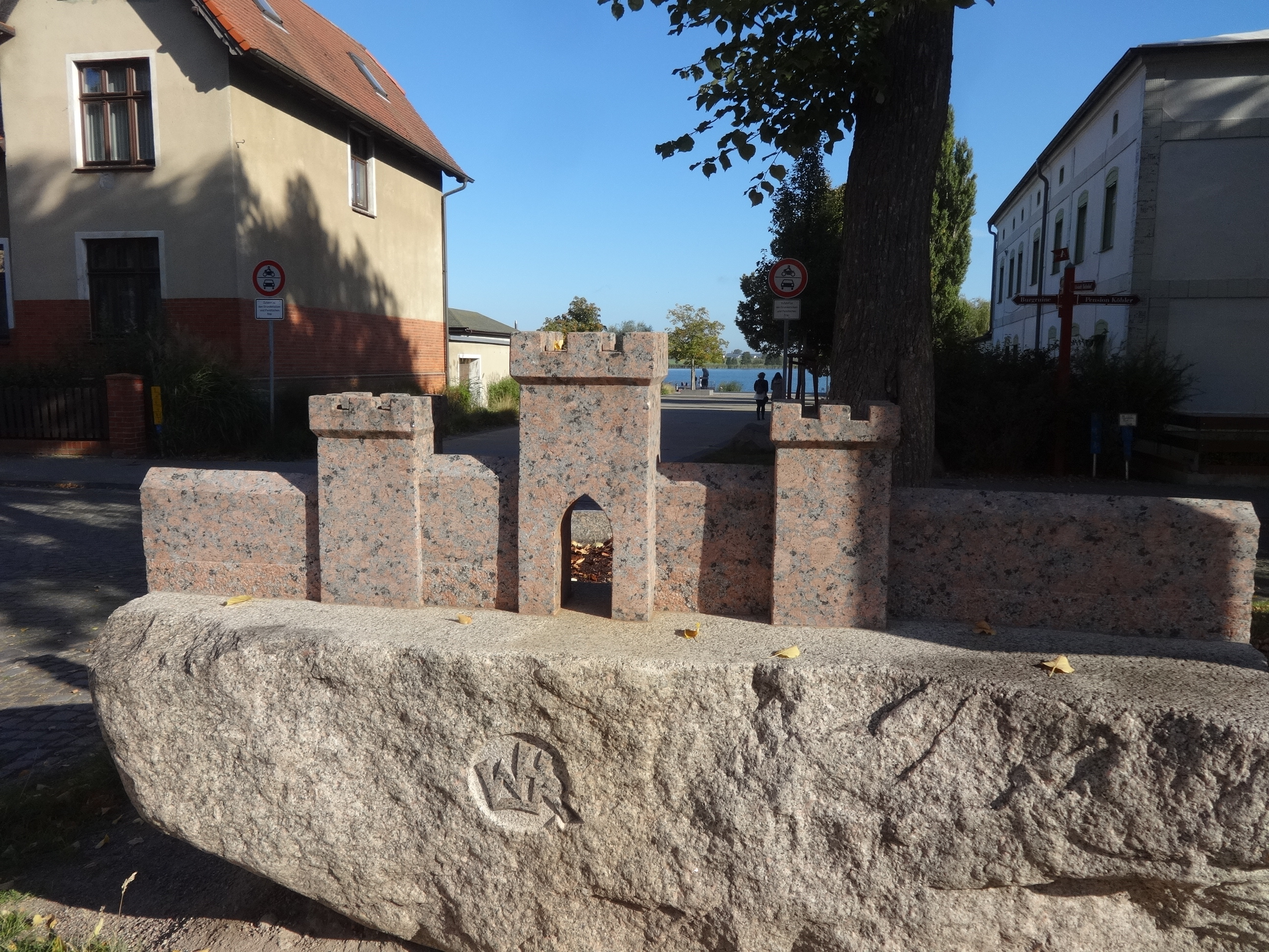 Das Seetor war eines von vier mittelalterlichen Stadttoren in Angermünde in der Uckermark. Der Sage nach trieb man einen Hirsch durch den Mündesee und erlegte ihn, nachdem er das Tor passiert hatte. So kam die Stadt zu ihrem Wappen. Im 21. Jahrhundert erinnert eine Findlingsskulptur und ein Hinweisschild an das ehemalige Stadttor.